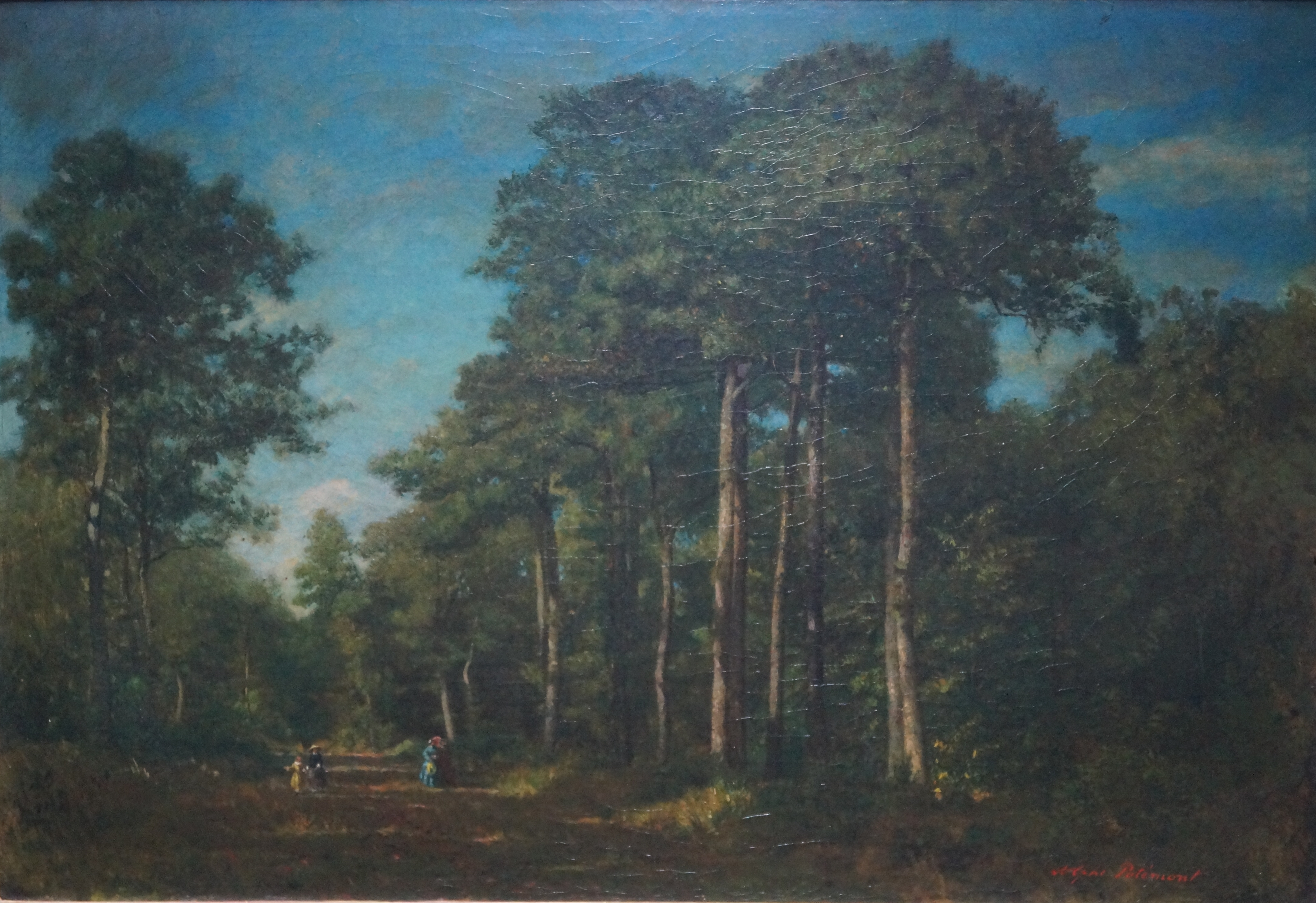 Huile sur toile, 45x32, signée Adolphe Potémont, sans date, titre au dos du tableau sur un montant du cadre: "environs de Paris, le bois de Meudon". Quatre personnages féminins par groupe de deux, dans une allée du bois, l'un avec un chapeau de paille de forme asiatique